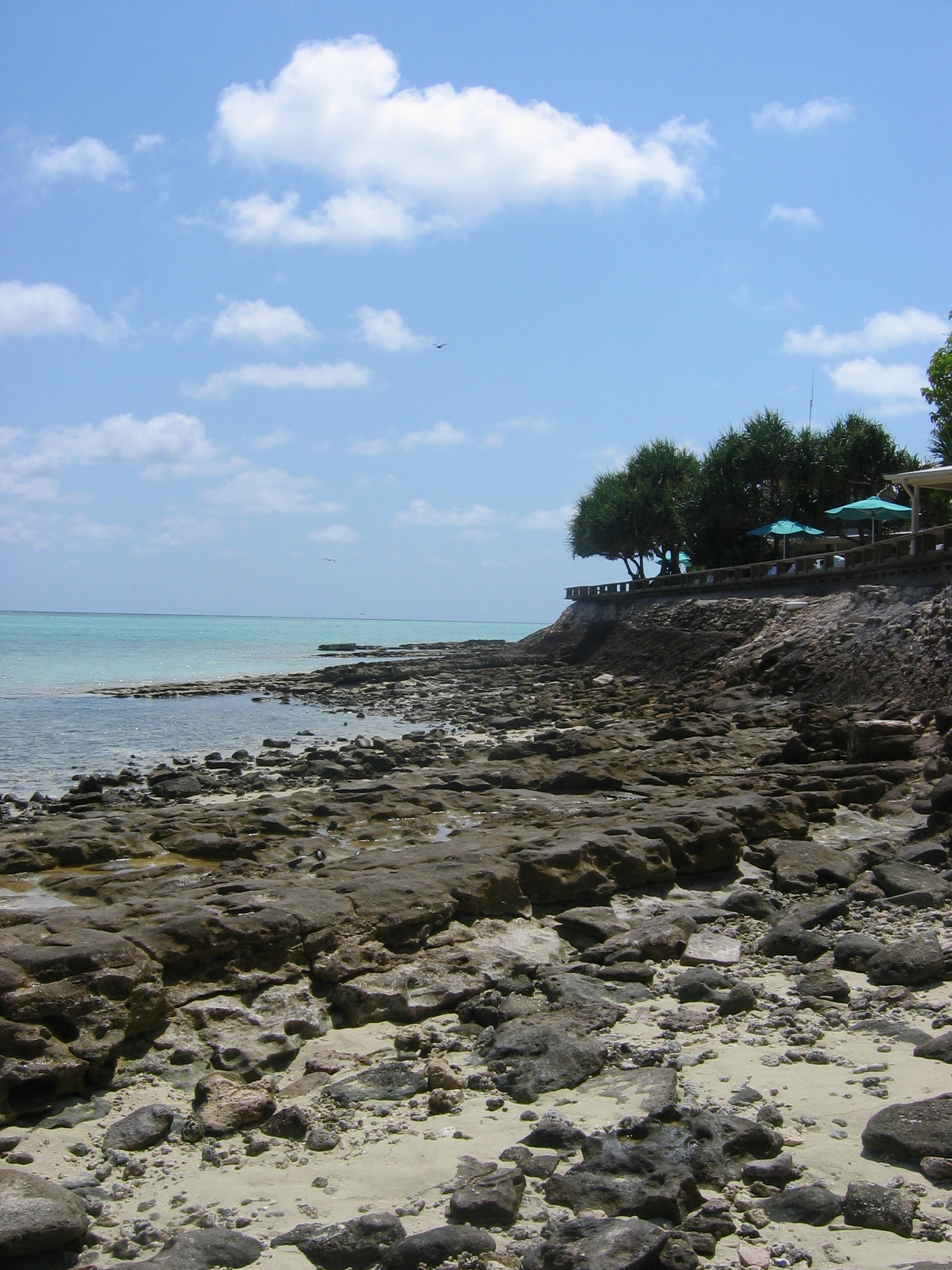 Tidevannssonen på Heron Island.